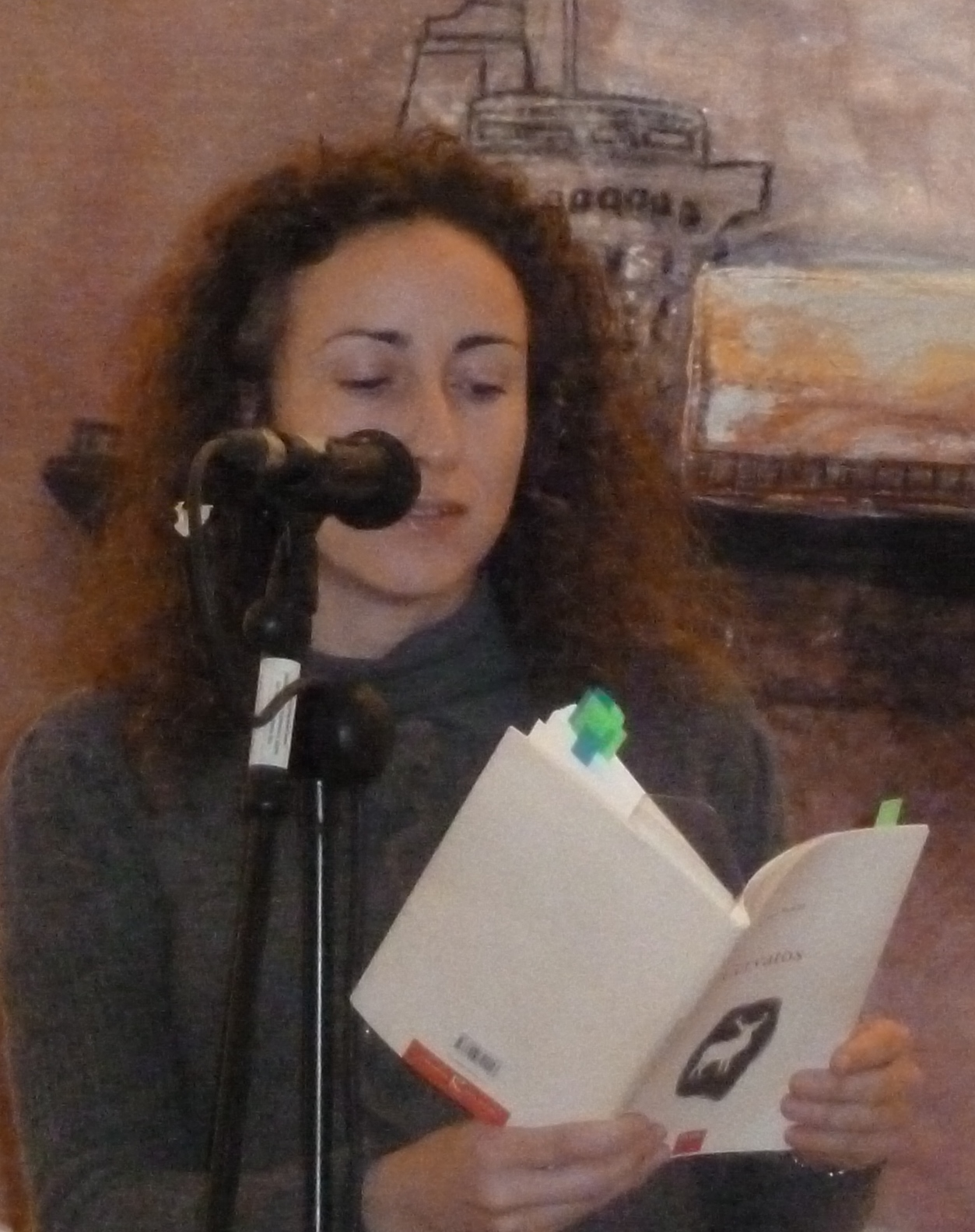 Lucía Novas recitando no Pazo da Cultura de Pontevedra o 8 de novembro de 2018